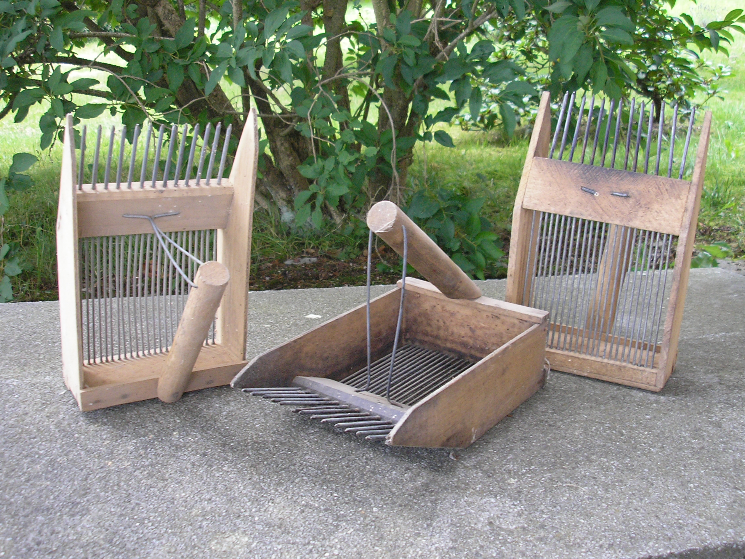 Heidelbeerkämme